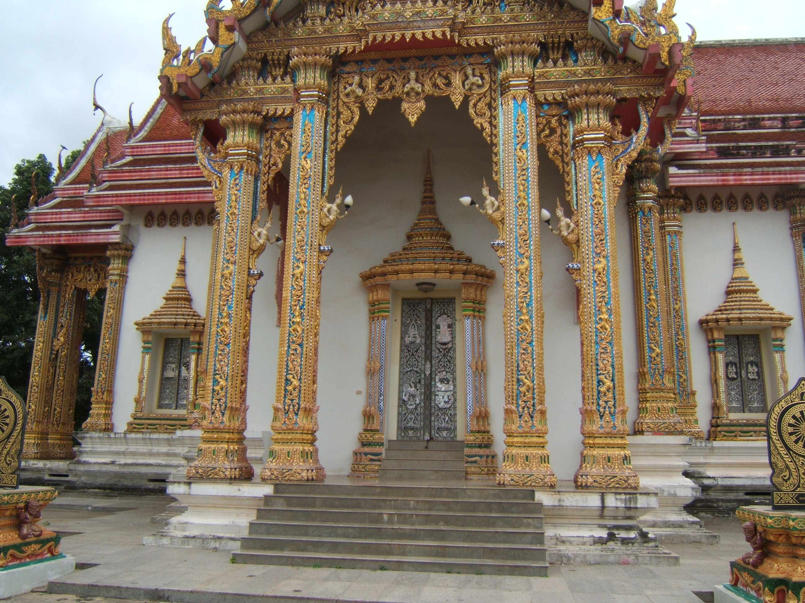 Hauptportal des Tempels Wat Chulamani / Phitsanulok